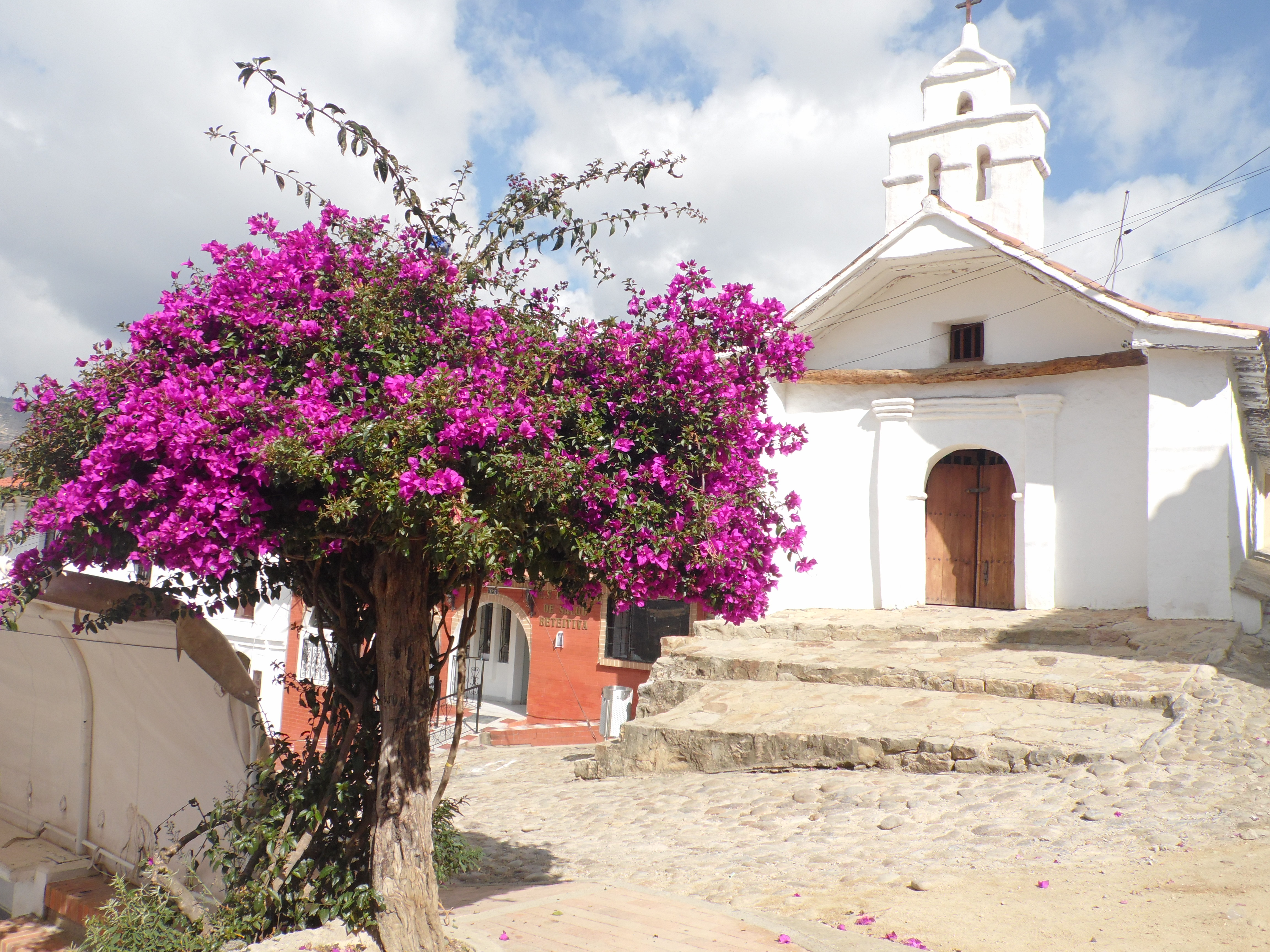 Foto de la capilla de Betéitiva (Boyacá)